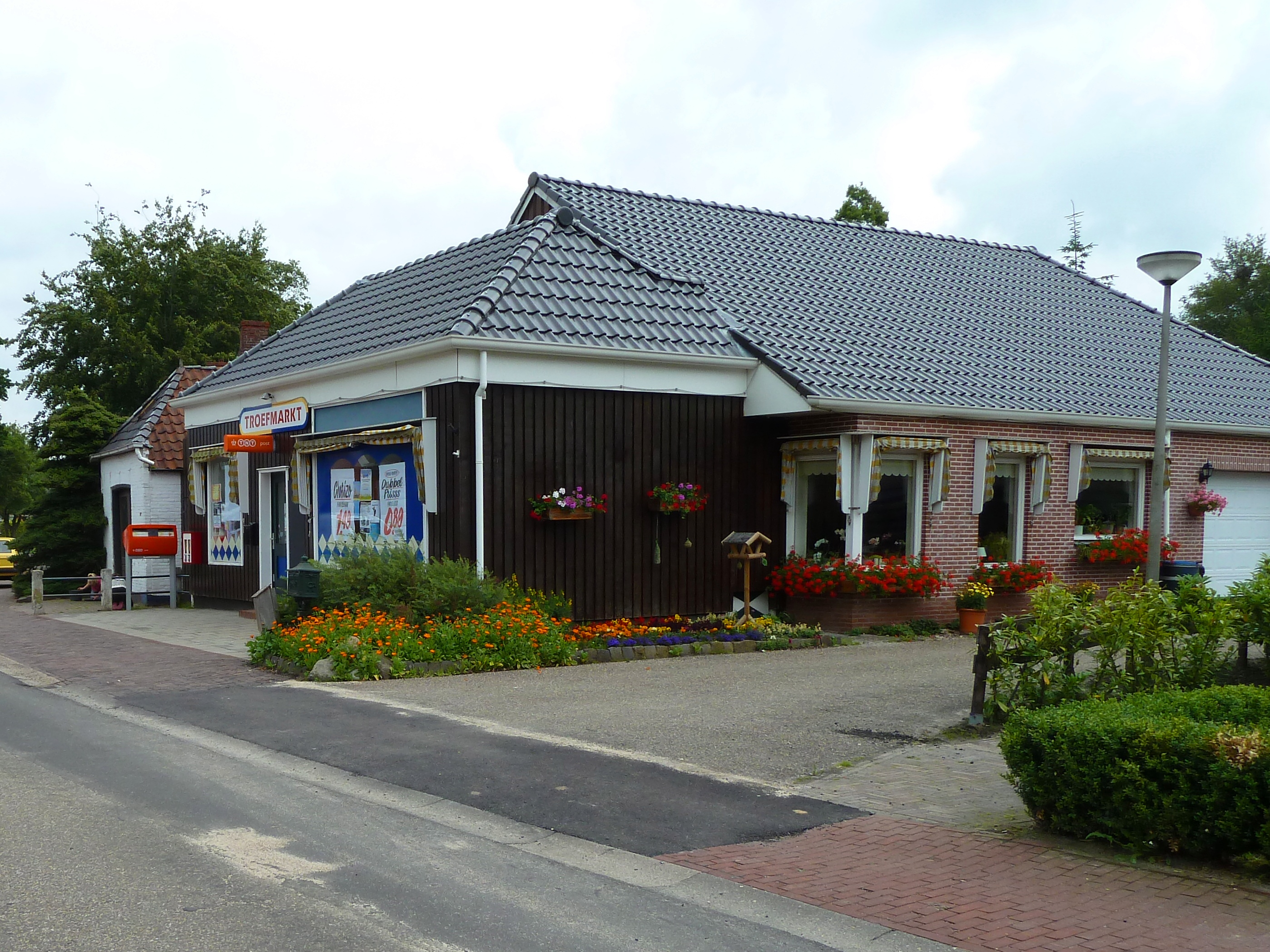 Supermarkt van Meedhuizen.